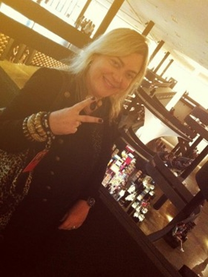 A jornalista e blogueira brasileira Heloísa Tolipan. Remix de foto original,também de Olimor, tomada durante evento de moda em Brasília.